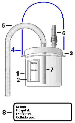 Componentes do Sistema coletor de secreÃ§Ã£o: Frasco coletor (1) transparente, graduado e atÃ³xico; GraduaÃ§Ã£o volumÃ©trica (2); Tampa (3) com vias (torres) para conexÃ£o dos tubos, rosca e anel de vedaÃ§Ã£o interna; AlÃ§a de transporte (4); Tubo de extensÃ£o (5) para conexÃ£o com a sonda de aspiraÃ§Ã£o ou endoscÃ³pio; Conector cÃ´nico (6) para conexÃ£o com o tubo de aspiraÃ§Ã£o do vÃ¡cuo hospitalar; Tubo interno (7); Etiqueta de identificaÃ§Ã£o (8).